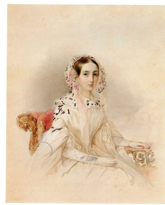 портрет принцессы Терезии Ольденбургской, урождённой Нассау (1815-1871)